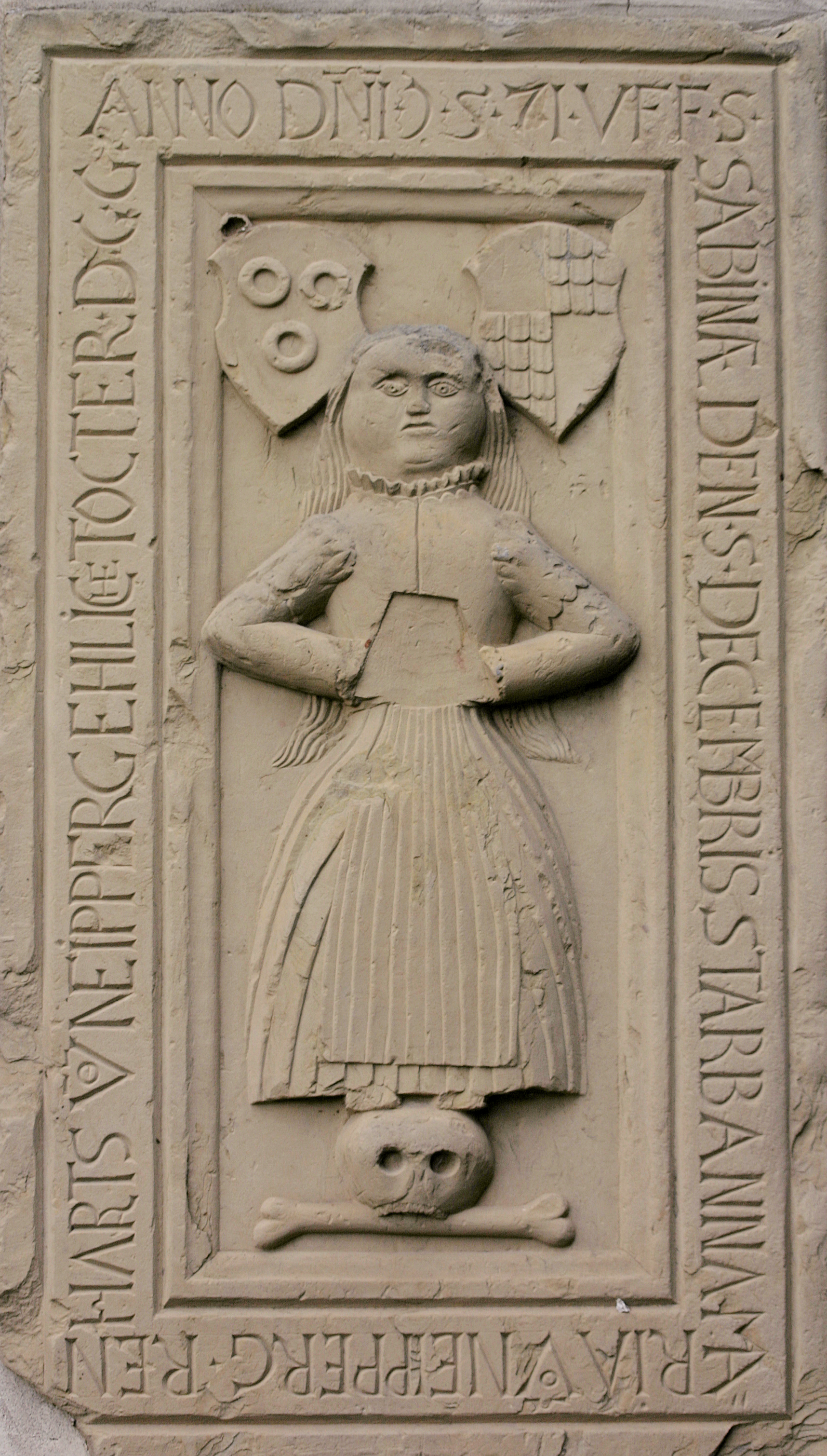 Grabplatte der Anna Maria von Neipperg an der evang. Kirche von Adelshofen